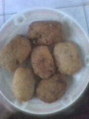 combro